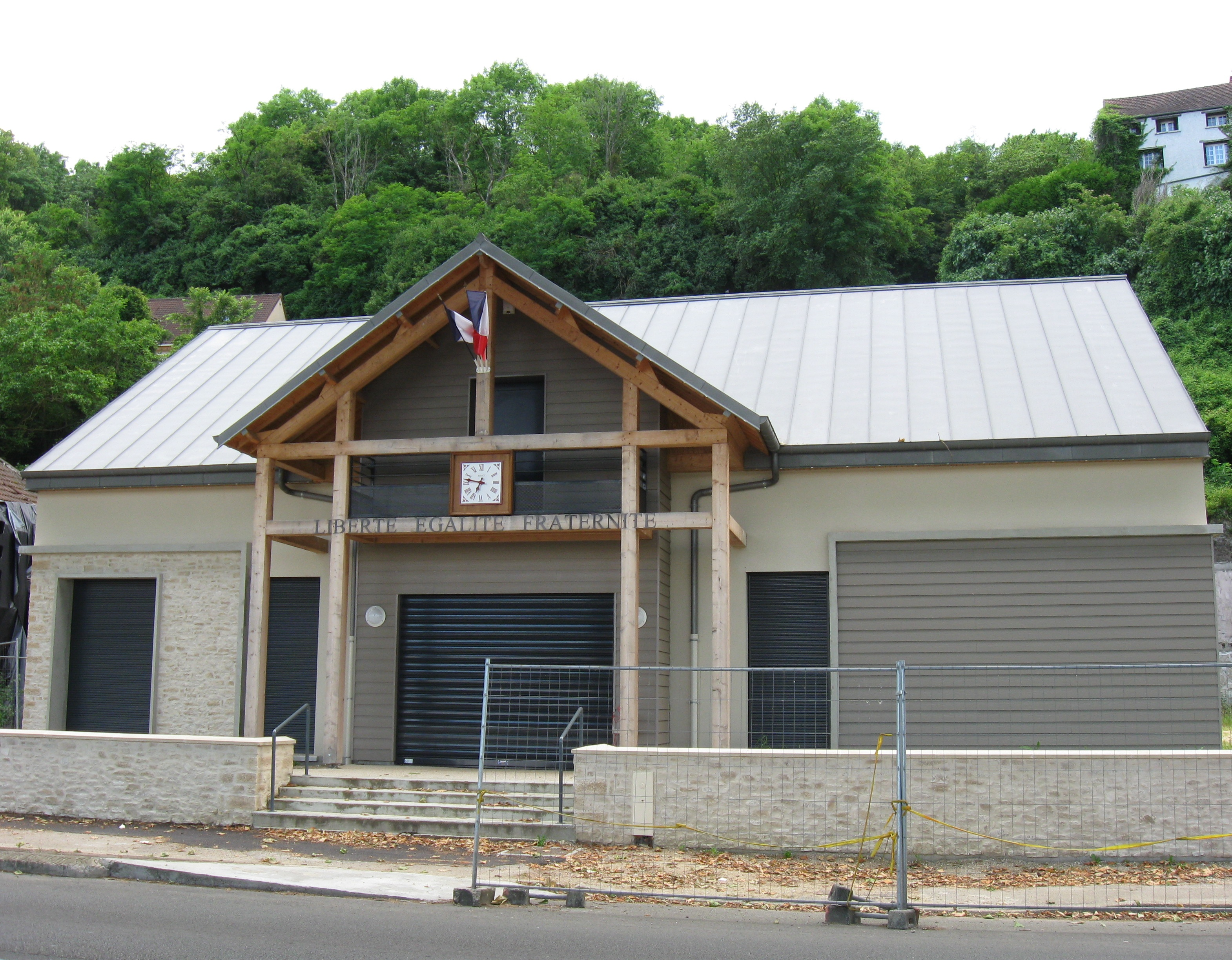 Mairie de Rolleboise. (département des Yvelines, région Île-de-France).